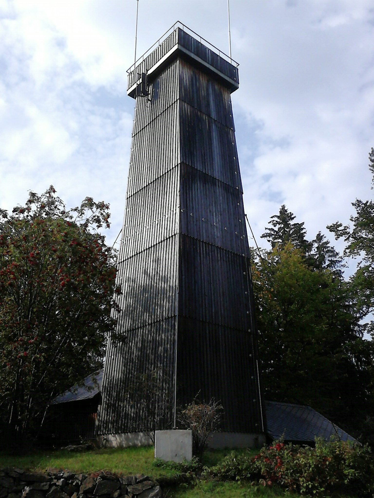 Der siebzehneinhalb Meter hohe hölzerne Aussichtsturm auf dem Steinberg bei Rothenkirchen / Wernesgrün. Gemeinde Steinberg, Sachsen, Deutschland.